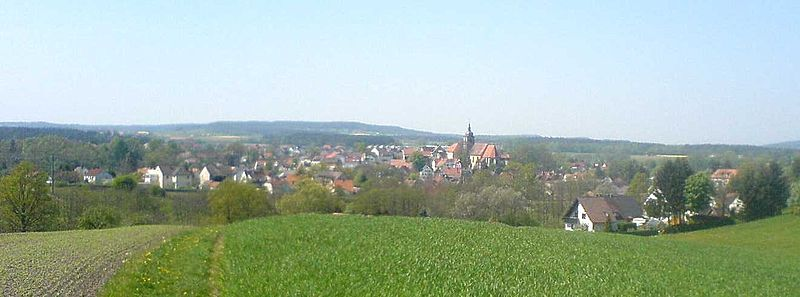 Panorama de Creussen